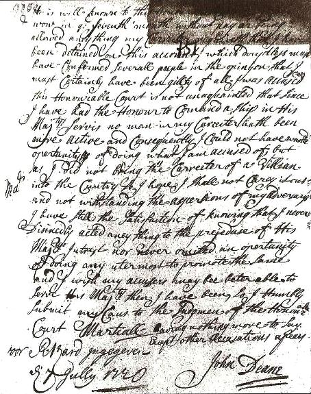 Письменное обращение Джона Дена в Военн-Морской суд Российской империи